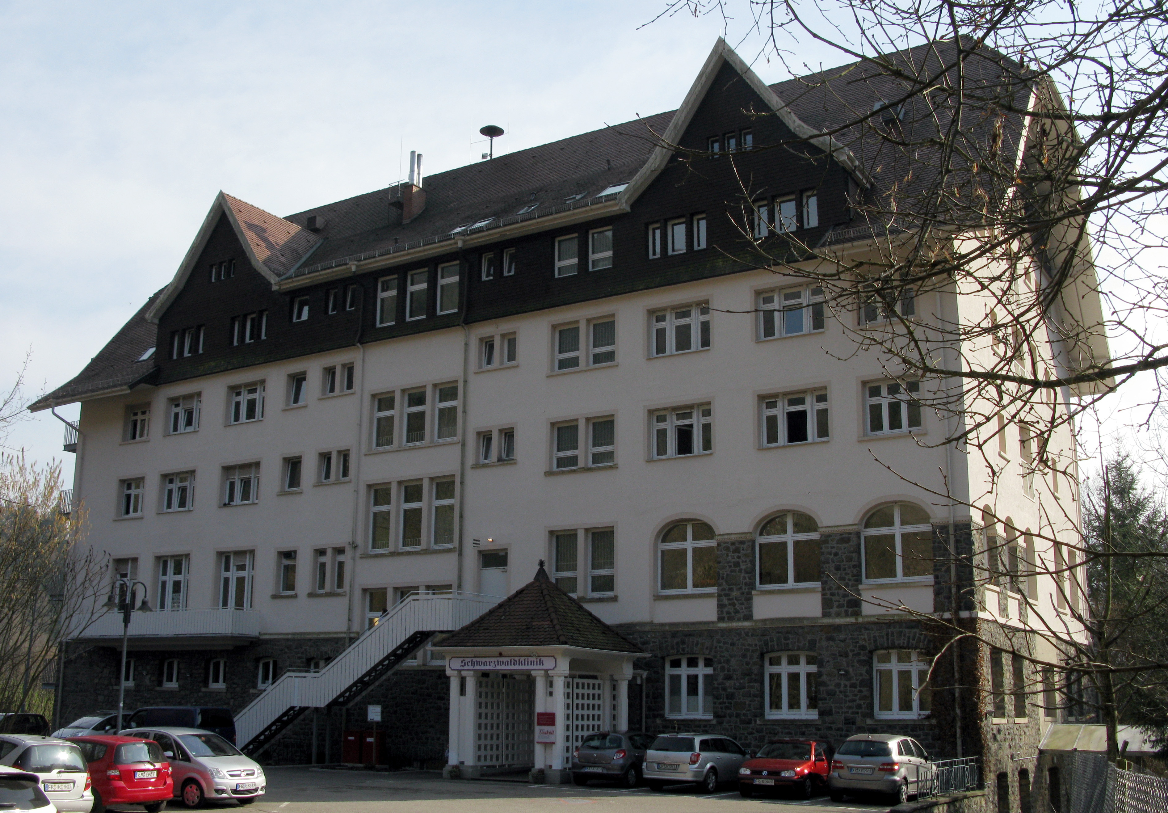 Carlsbau im Glottertal, bekannt durch die Fernsehserie Die Schwarzwaldklinik.